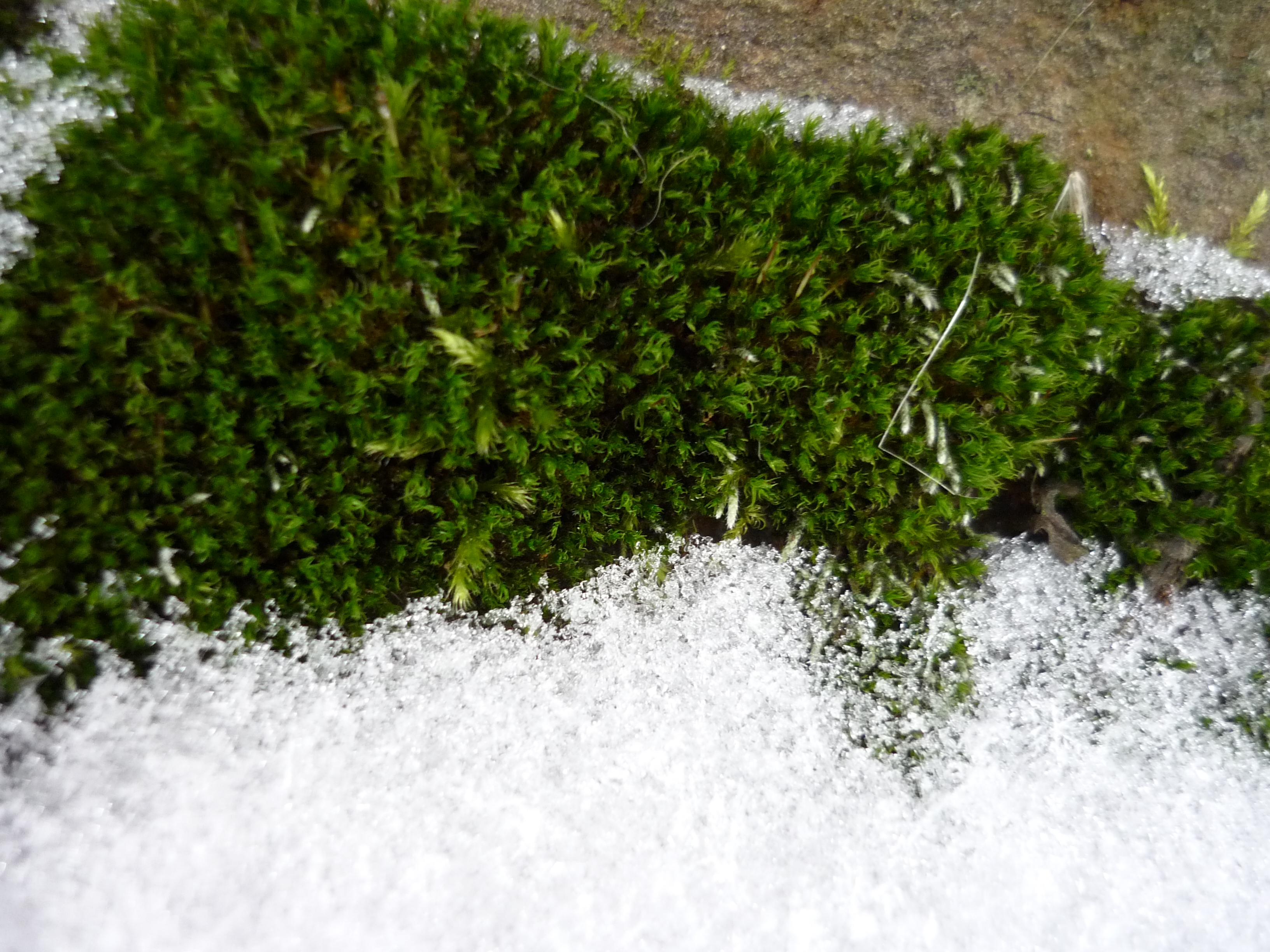 мох в водосточной трубе зимой